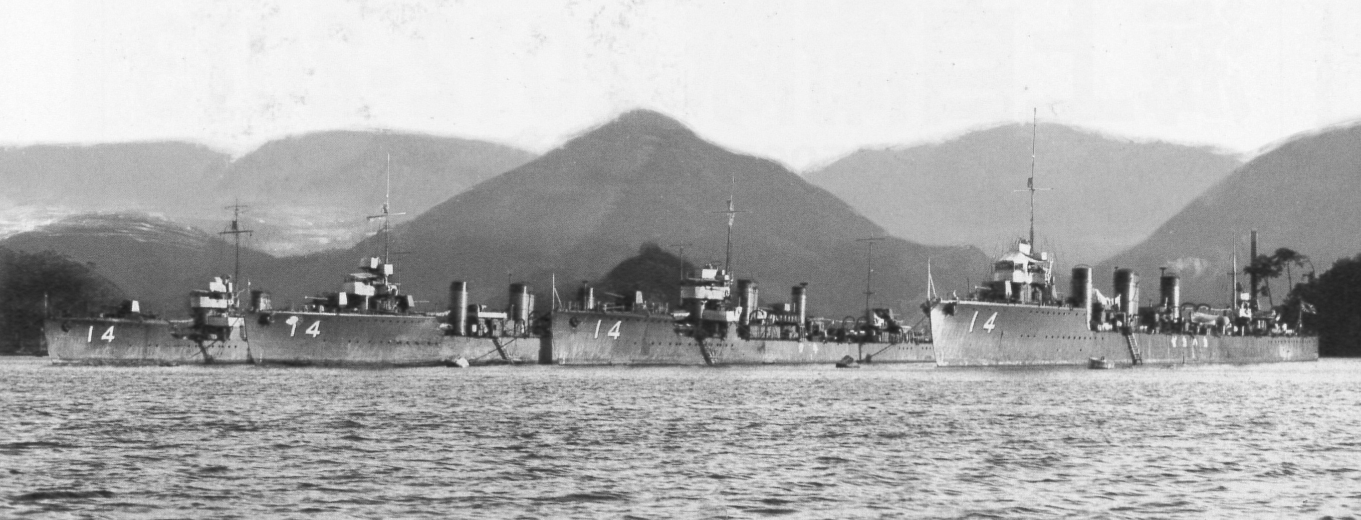 大正末から昭和初年にかけての第14駆逐隊。左から葵、谷風、菊、江風